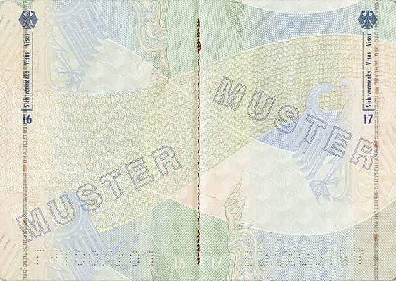 Innenseite des deutschen Reisepasses (Muster 2017).